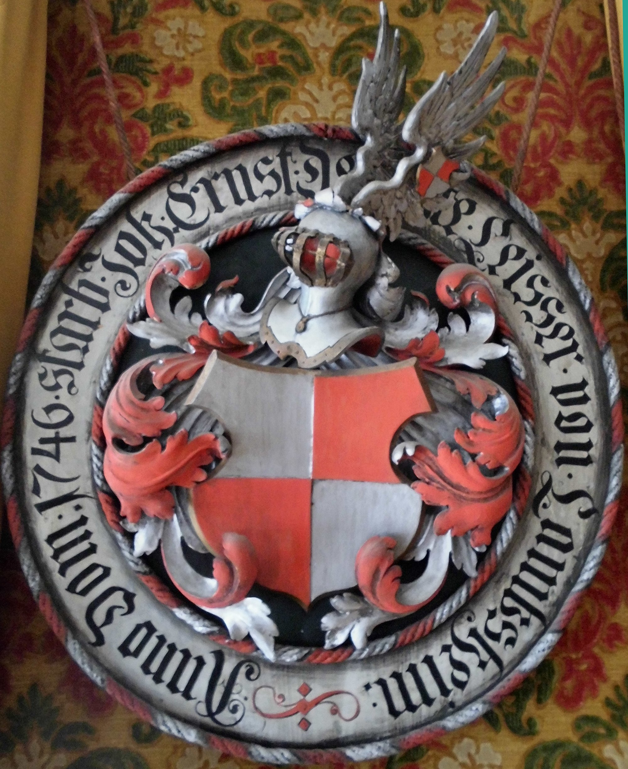 Die Totenscheibe erinnert an Johann Ernst Leyser (Leisser) von Lambsheim, den letzten männlichen Spross der Leyser von Lambsheim, eines alten Adelsgeschlechts, das über Jahrhunderte in Deidesheim ansässig war. Schild: Geviertet, in den Farben Silber und Rot Helmzier: Silberner Flug, mit dem Schildbild belegt Decken: Silber und Rot